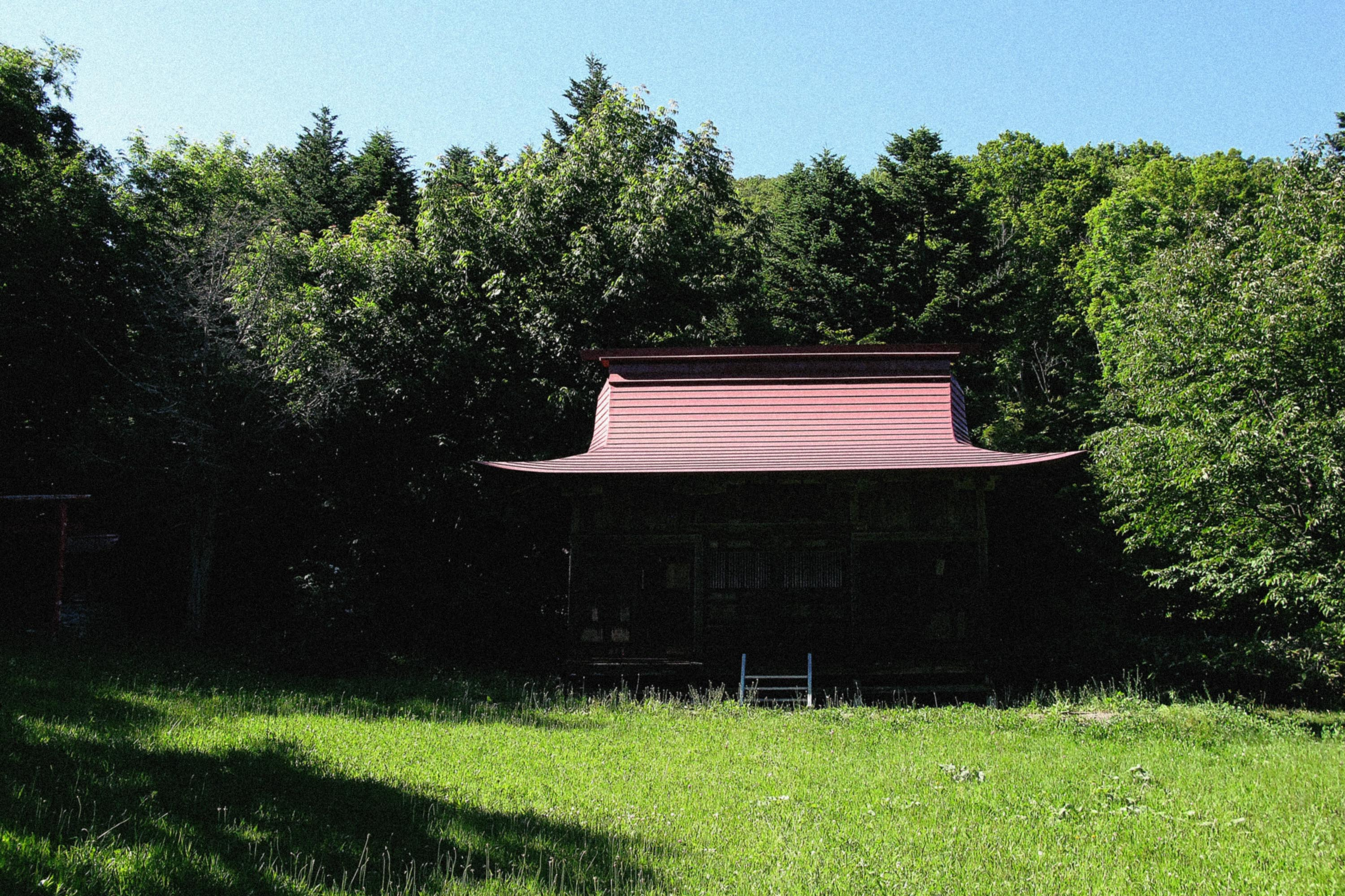 1919年9月19日に「白瀧神社」として創建された上白滝神社。建築委員会の寄付世話係としてのちに合気道を創設した入植者の植芝盛平の名が残されている。